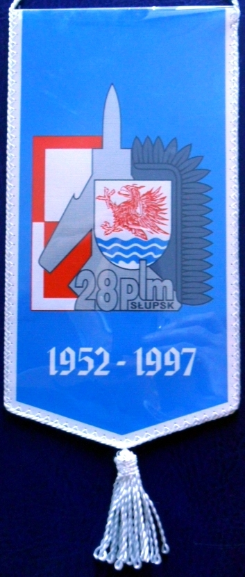 Proporczyk 28 plm.